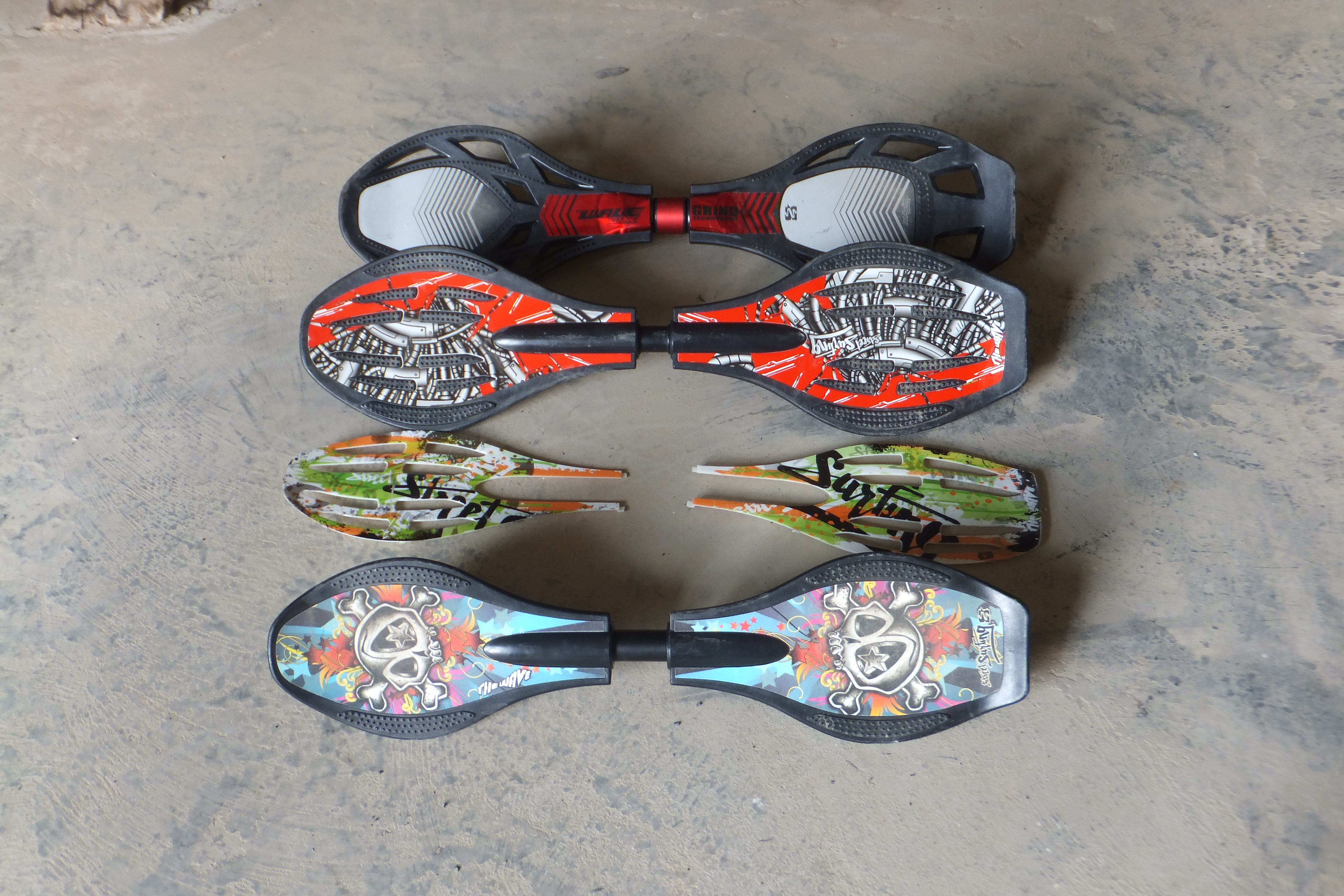 mes waveboard la bleu est une G2 mini, la rouge est une original,et la grise est une GLX